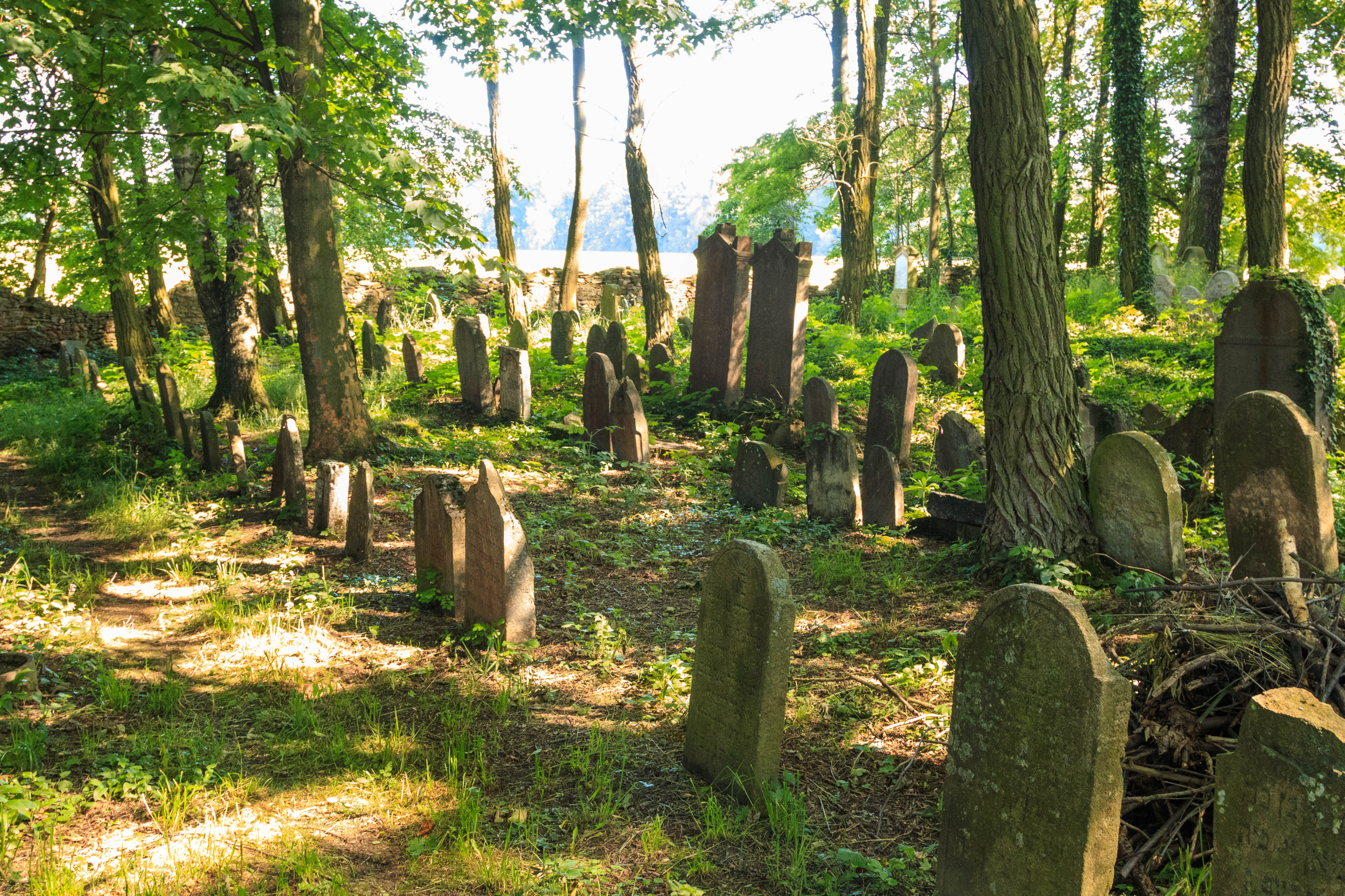 Židovský hřbitov, Z od silnice k Čáslavi, Habry, Habry. Project: Židovské památky.